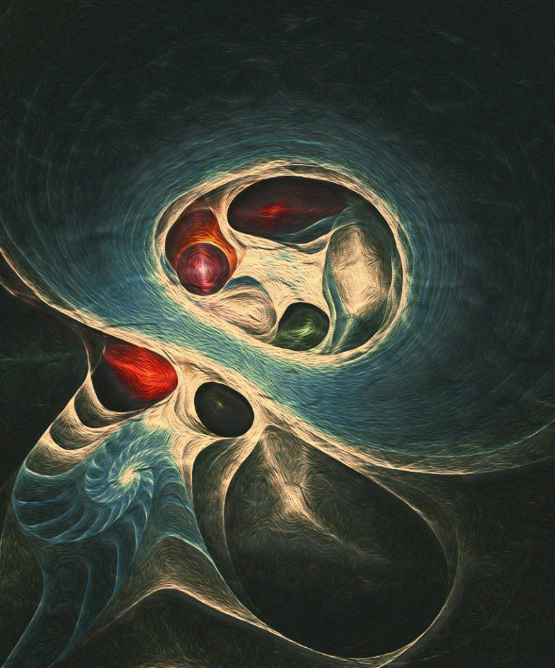 Vue d'artiste d'un univers possédant des dimensions fractales selon Jonathan Huot